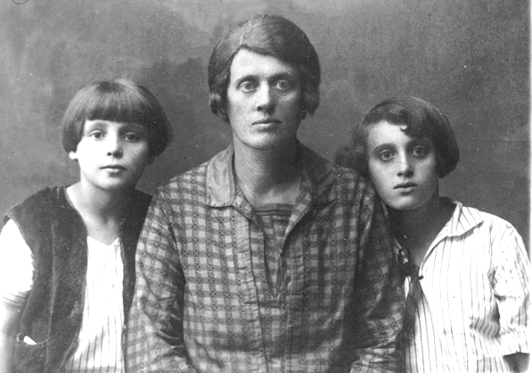 Chaïa Zimetbaum-Schmelzer et ses deux filles, Mala (à gauche) et Merjem (à droite), photographie prise à Brzesko vers 1926